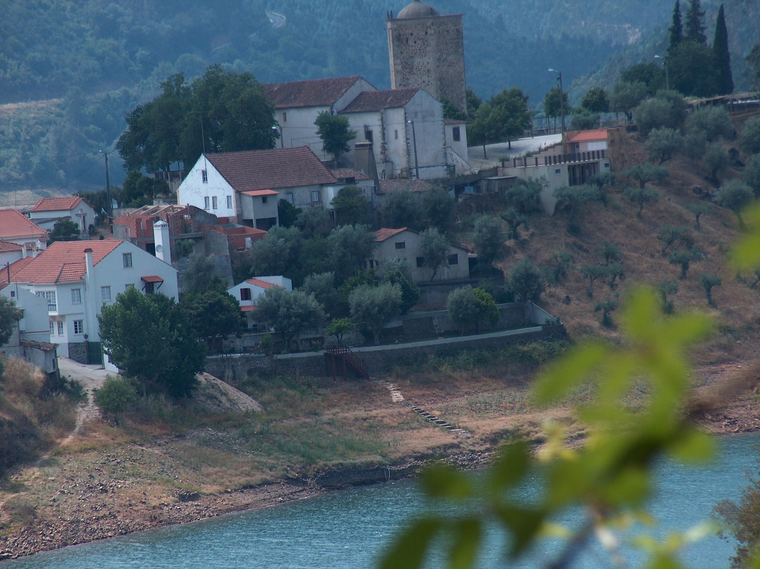 Torre de Dornes